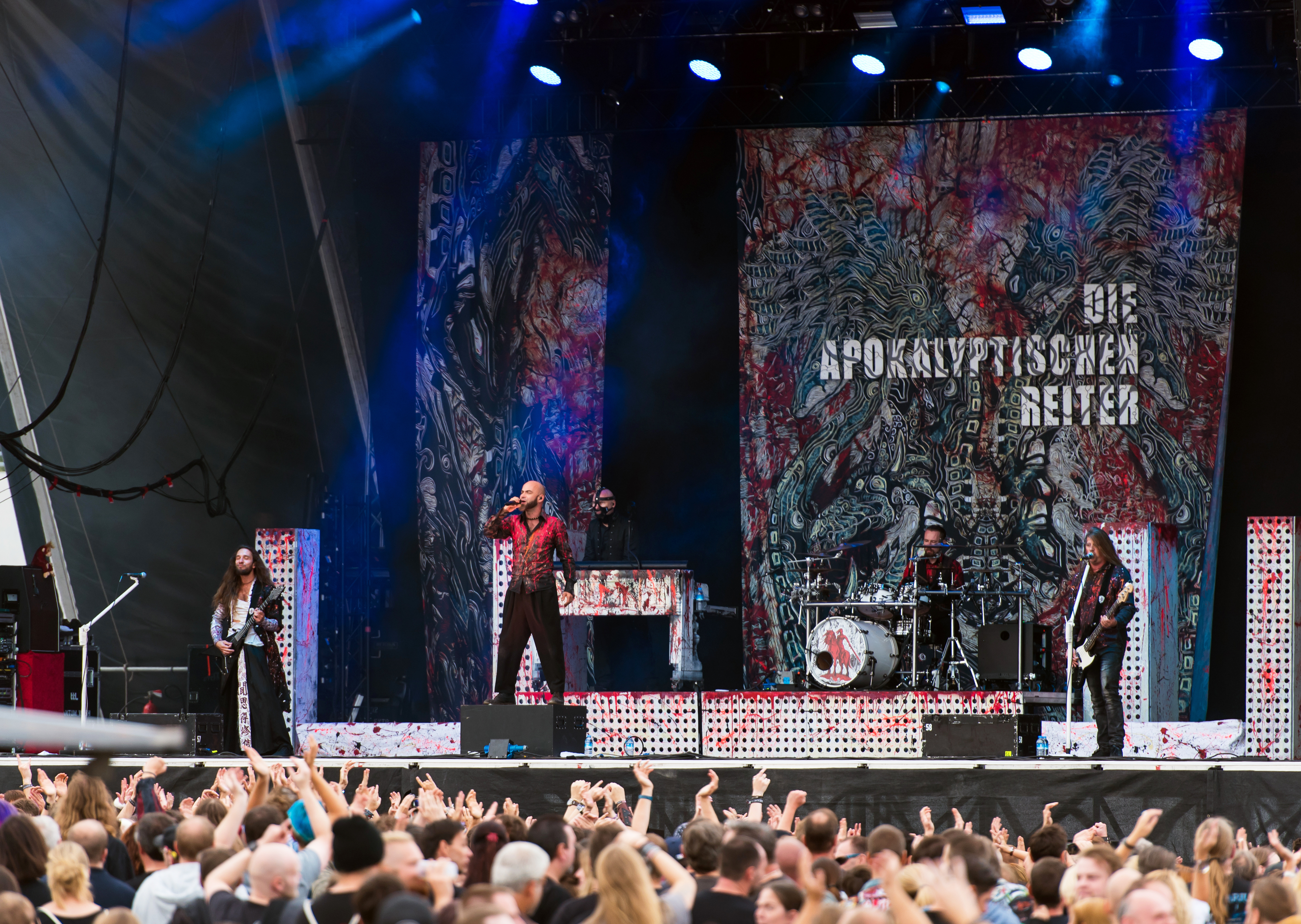 Die Apokalyptischen Reiter beim Hammaburg Fest 2018